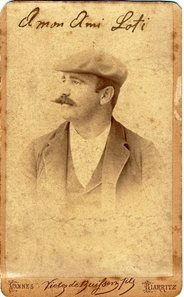 OTHARRE. PELOTARI AMIGO DE PIERRE LOTI. 1881. EN EL BASARIA SU NOVELA RAMUNTCHO ESCRITA EN 1887. ARCHIVO: MAISON PIERRE LOTI EN ROCHEFORT (1891)